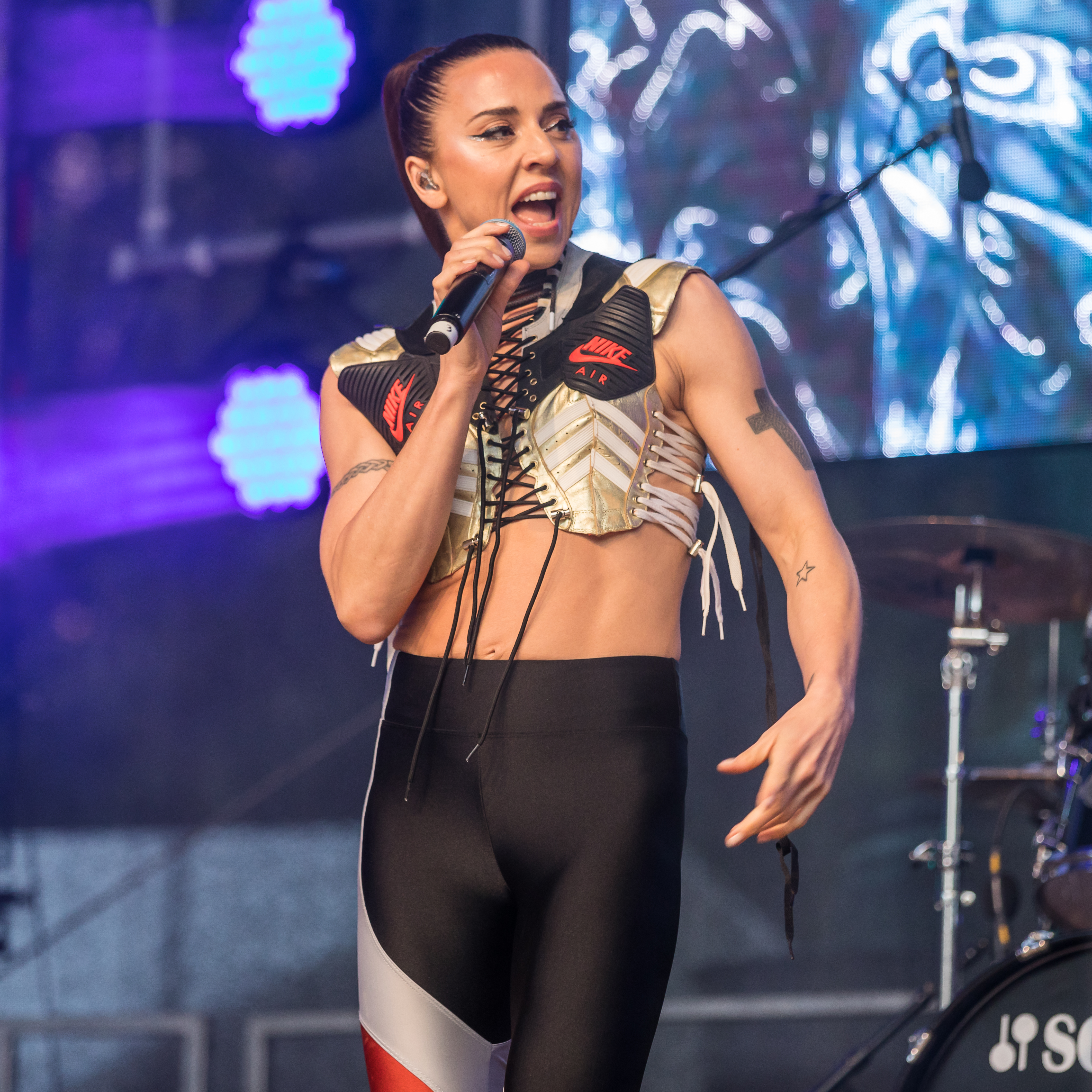 ColognePride 2019-Sonntag-Hauptbühne-2111-Melanie C. ft. Sink the Pink